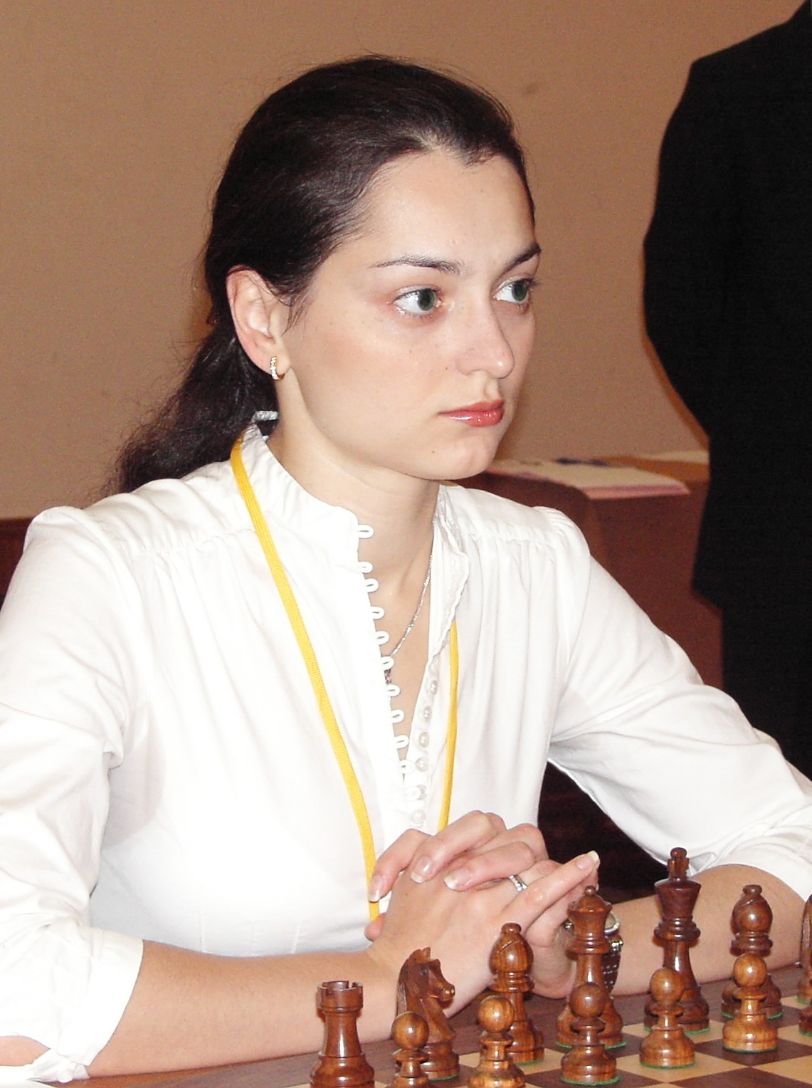 GM Alexandra Kosteniuk Russia, EuroChess Iraklion 2007